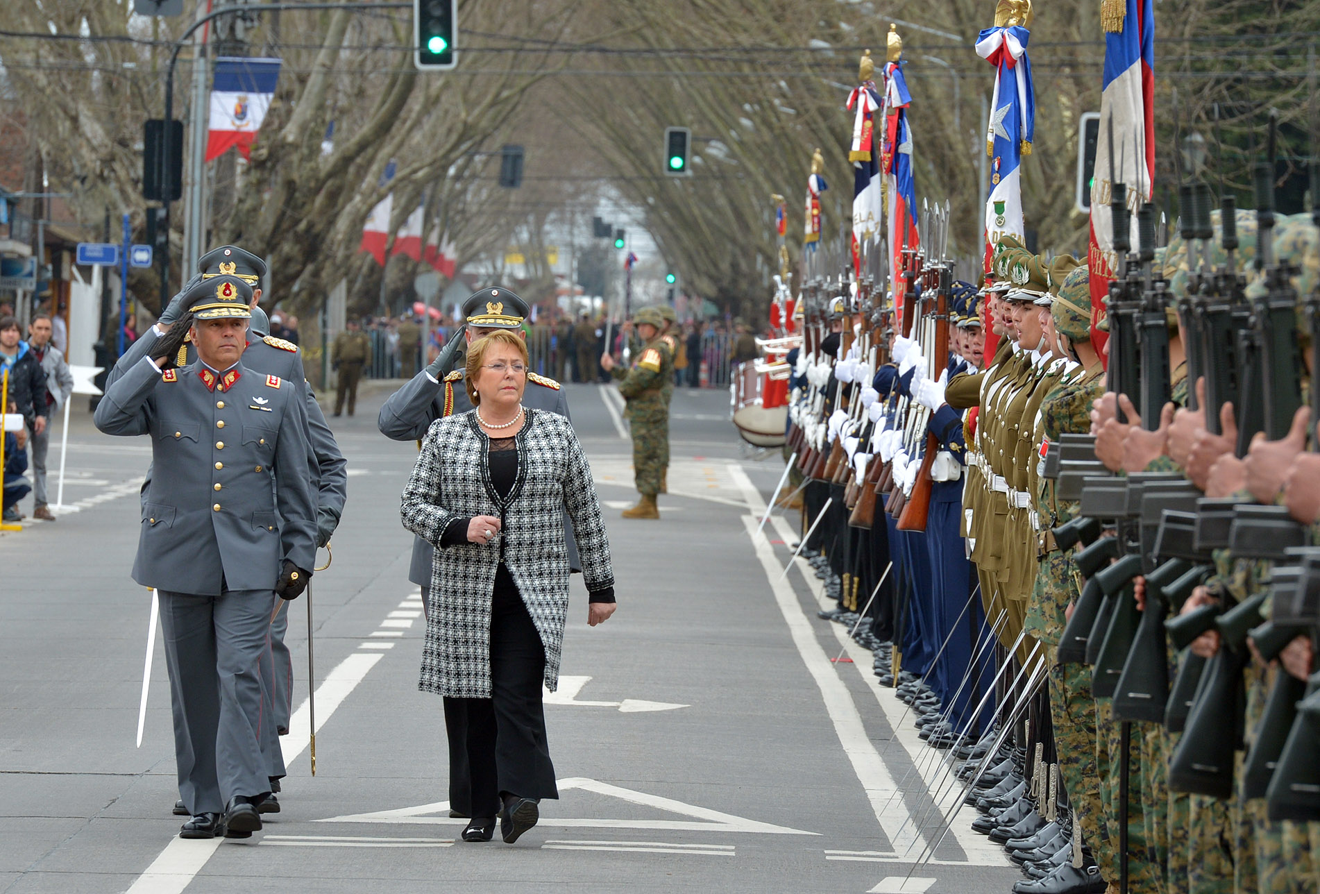 Gobierno de Chile